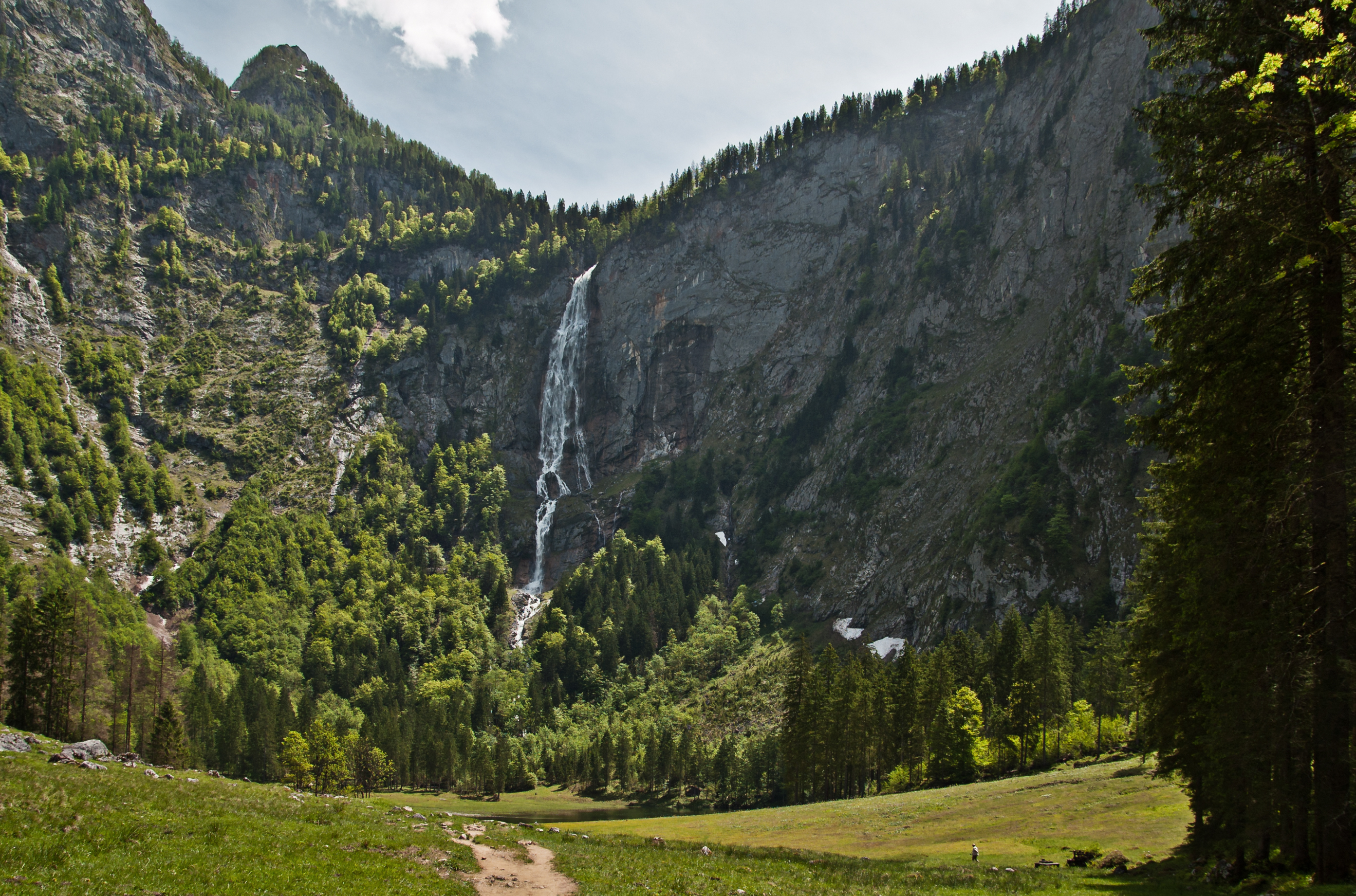 Der Röthbachfall oberhalb der Fischunkelalm